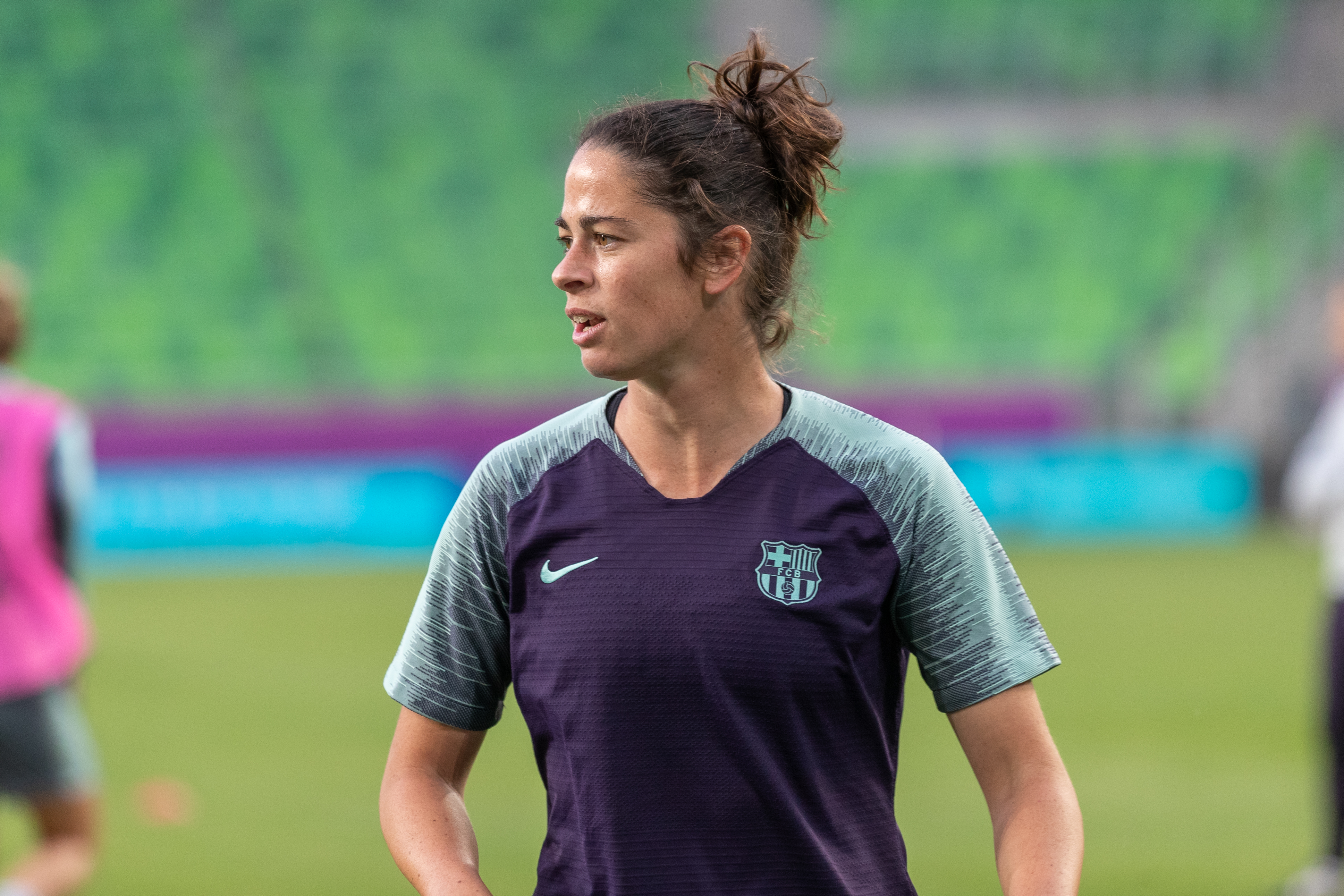 Marta Torrejon (FC Barcelona, 8) beim Abschlusstraining